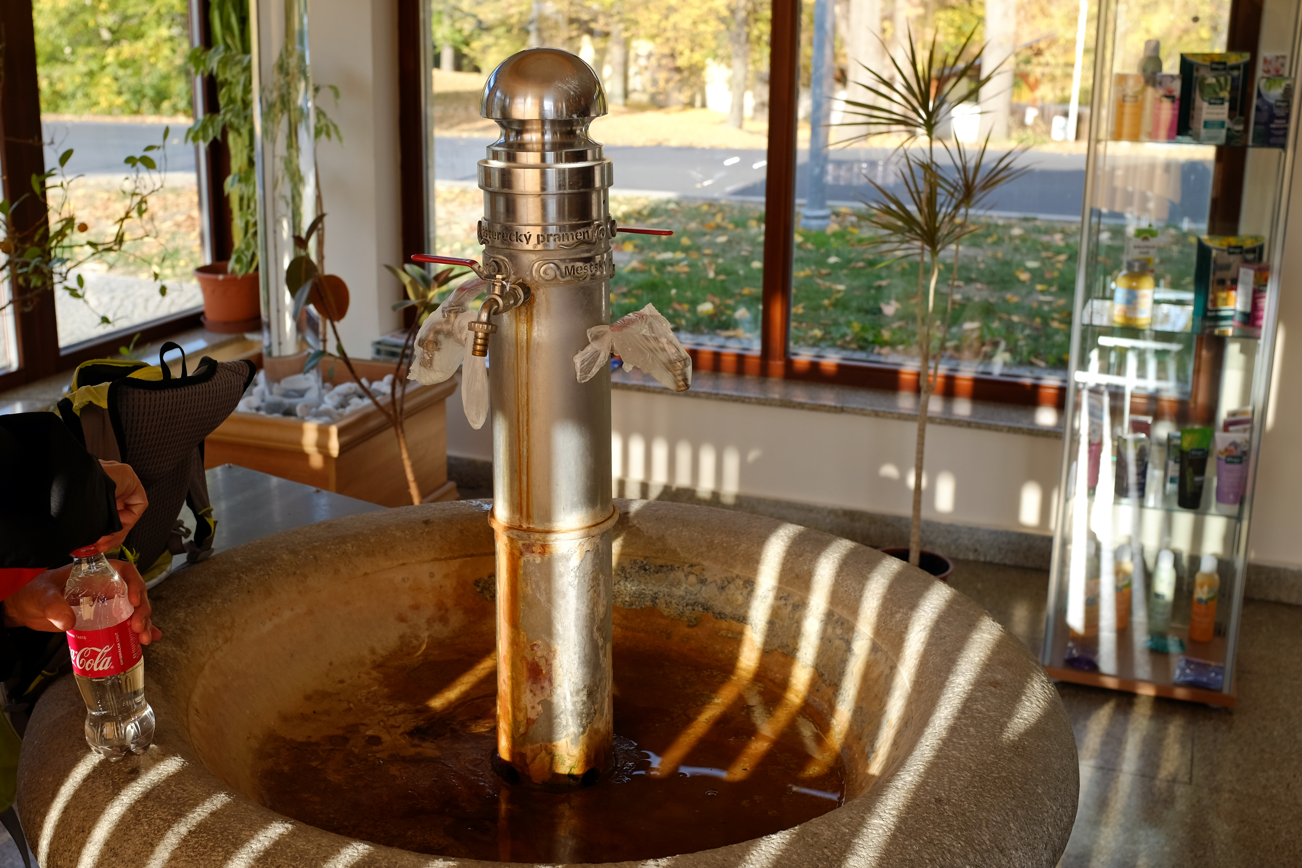 Klášterec nad Ohří, lázně Evženie, pavilon a infocentrum s Městským pramenem, Kláštereckým pramenem a pramenem Evženie